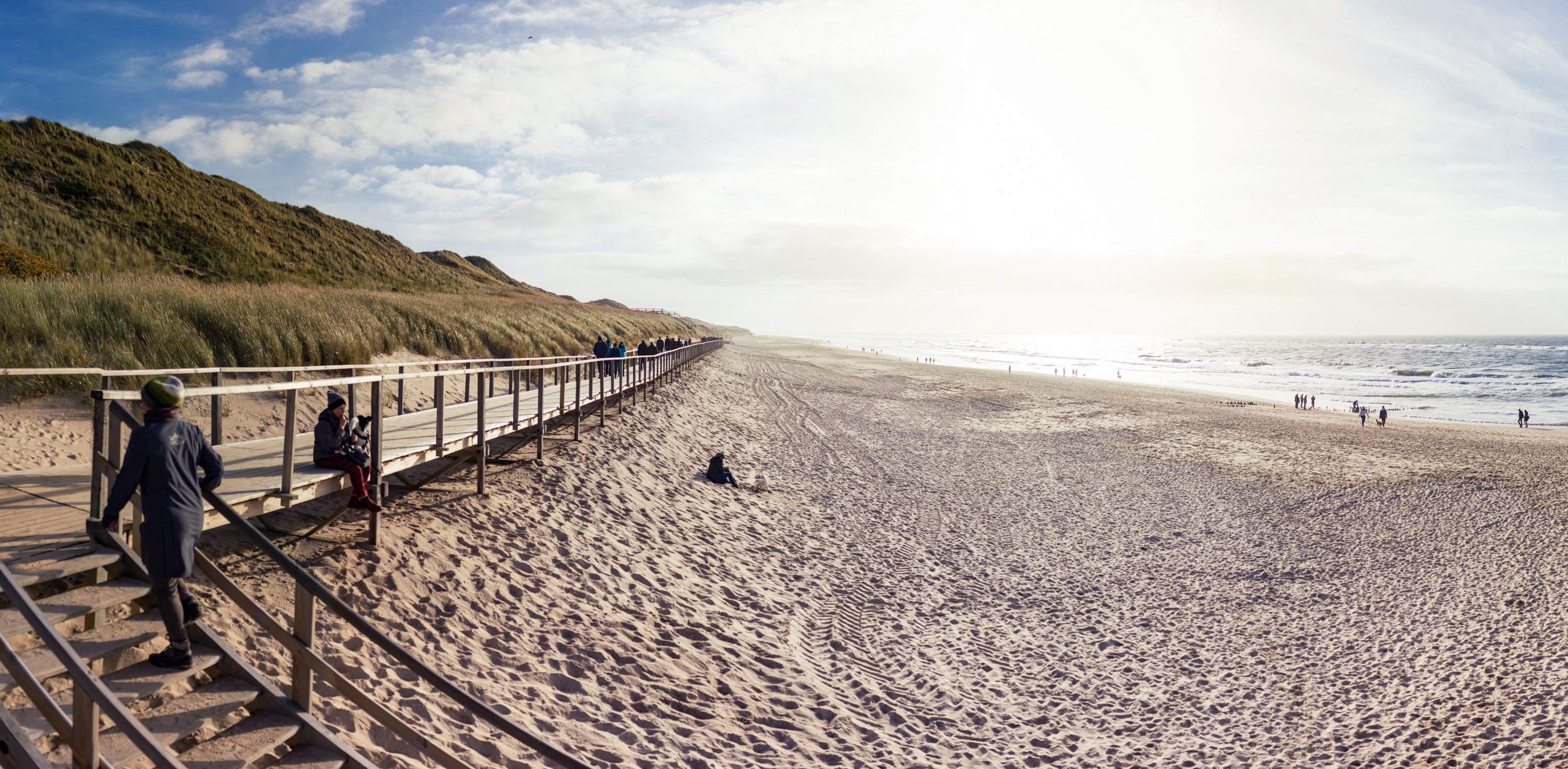 Der Westerländer Strand in Richtung Süden. (Herbst 2015)